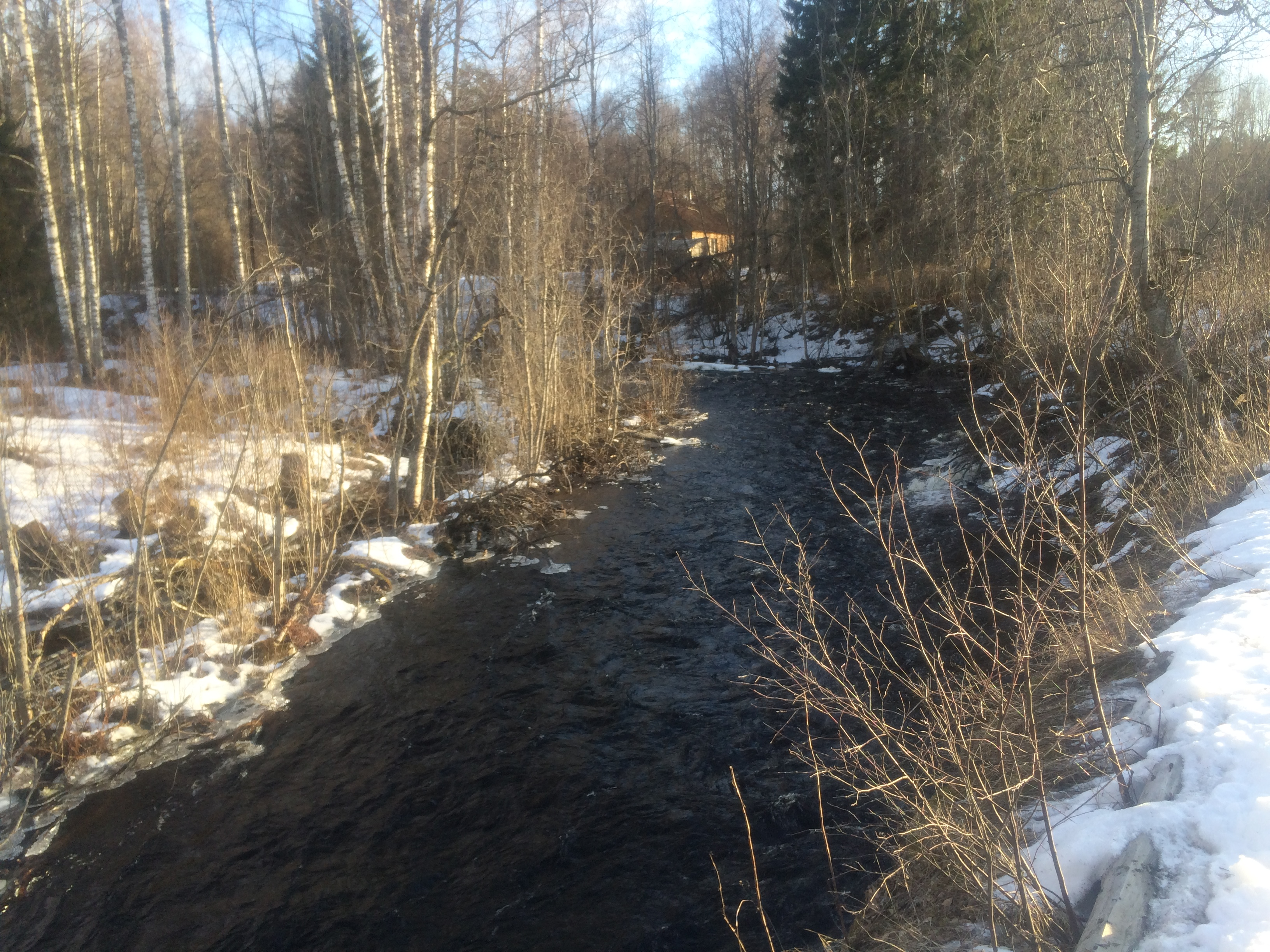 Улмосенйоки